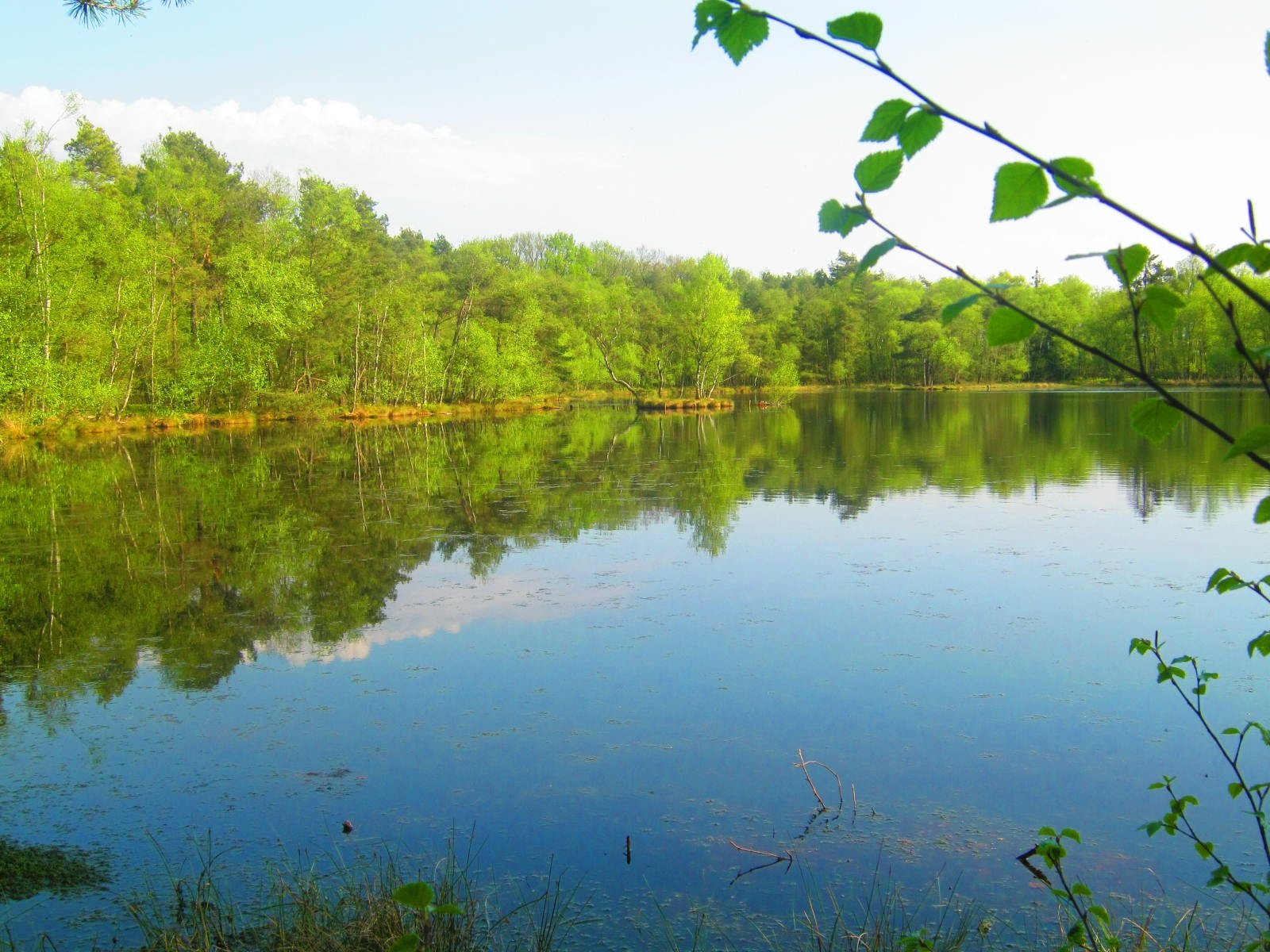 Der Birkensee im gleichnamigen Naturschutzgebiet in der Lüneburger Heide in Niedersachsen.